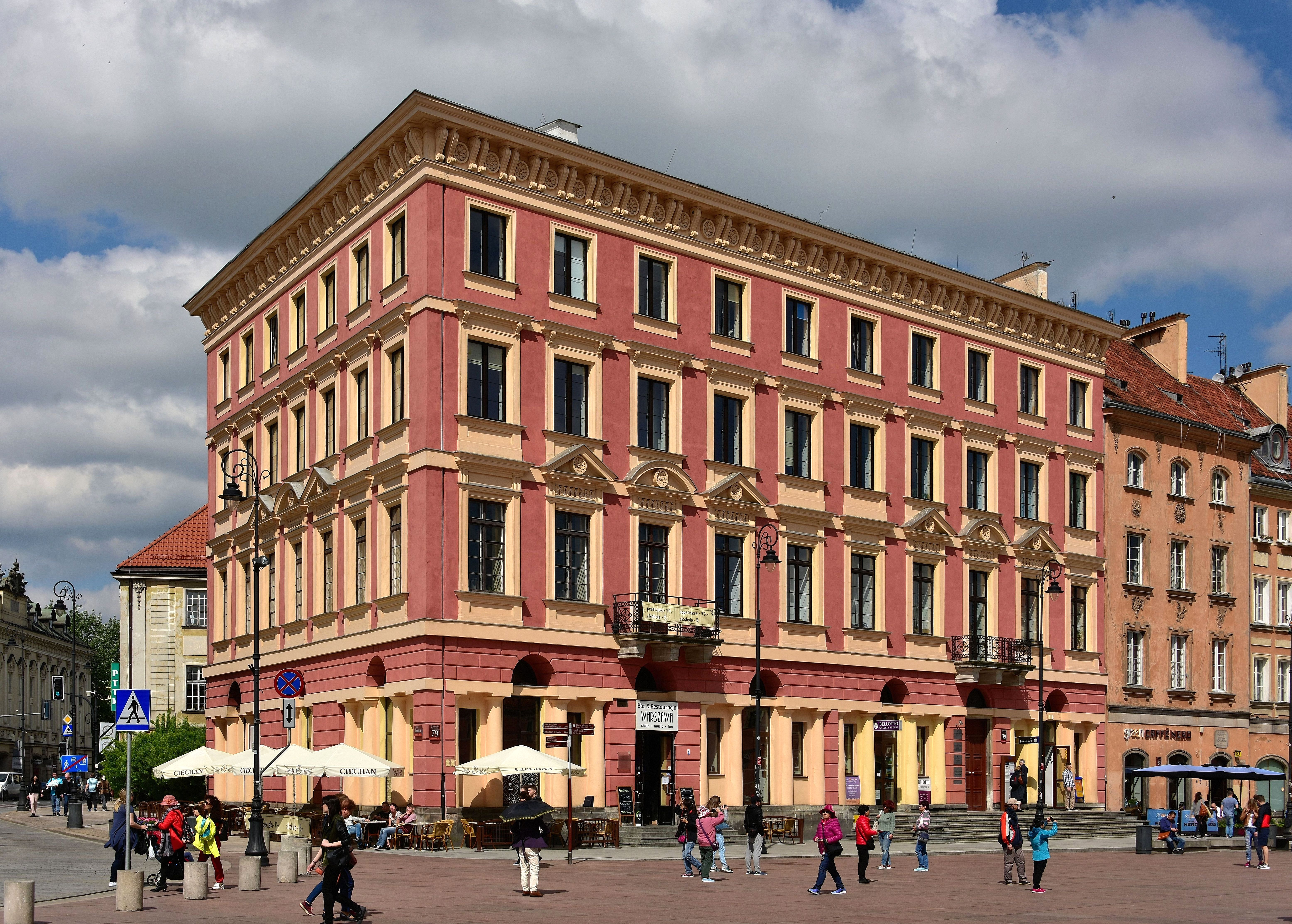 Kamienica Hurtiga i Roeslera w Warszawie